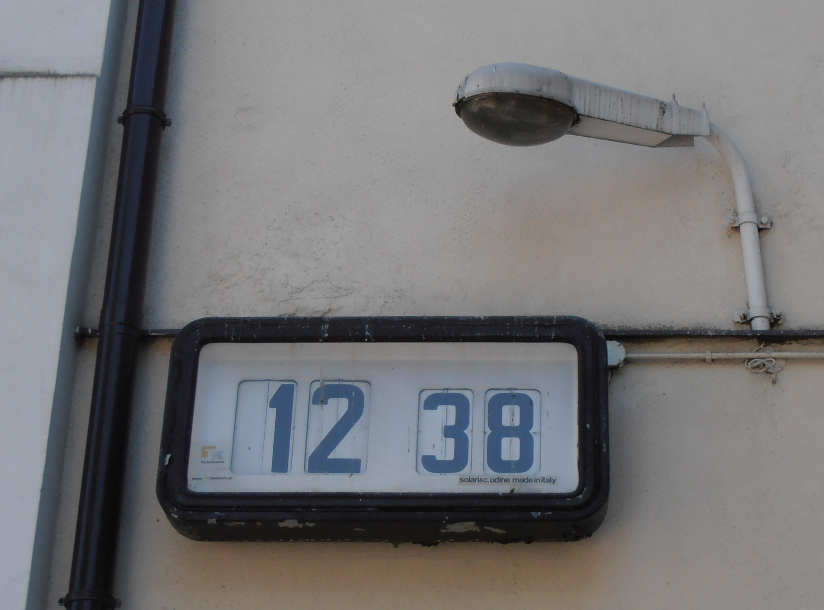 Zegar na ścianie dworca w Łowiczu. I lampa też.